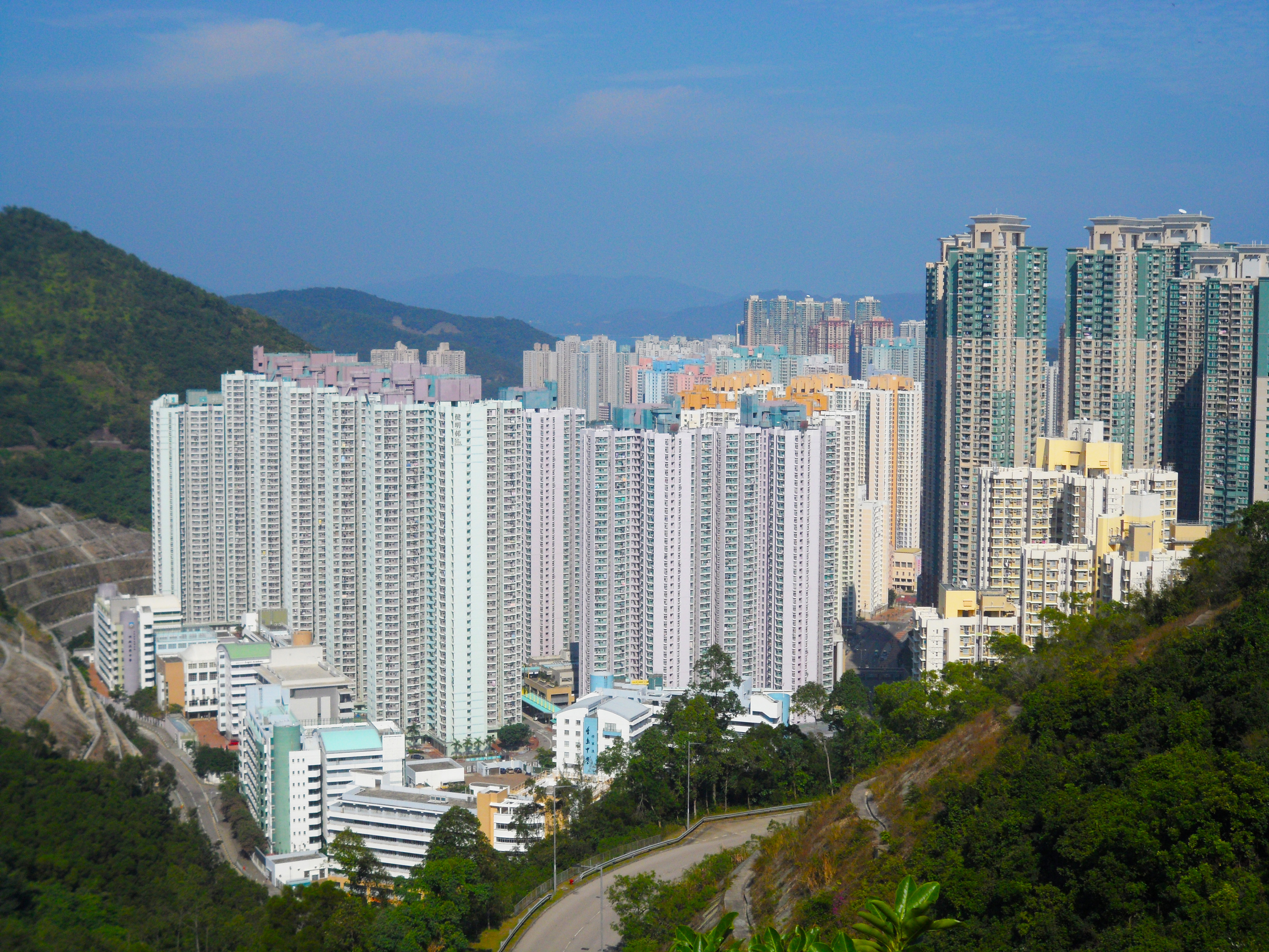 遠眺調景嶺健明邨及善明邨樓宇